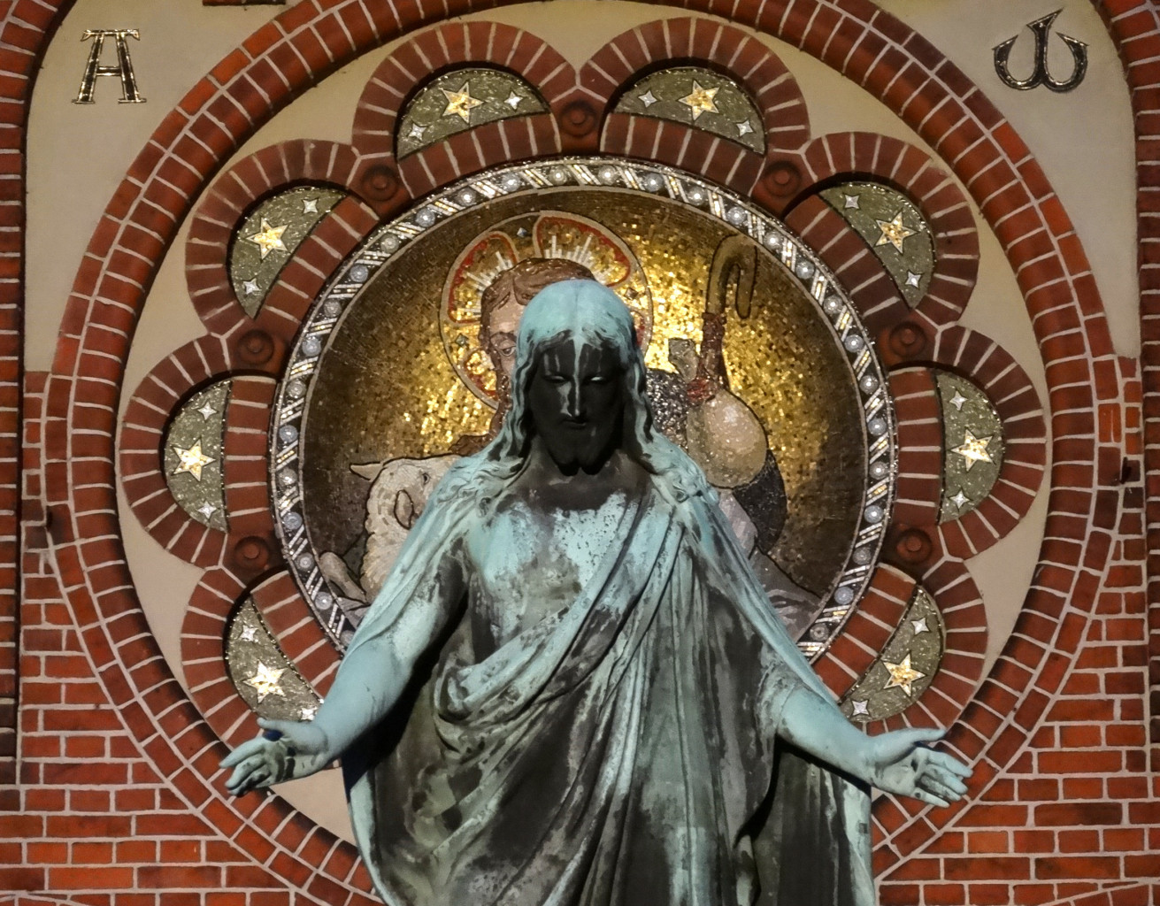 Posąg Chrystusa (replika rzeźby Bertela Thorvaldsena, pocz. XX w.) przed ewangelicko-augsburskim kościołem Zbawiciela w Bydgoszczy